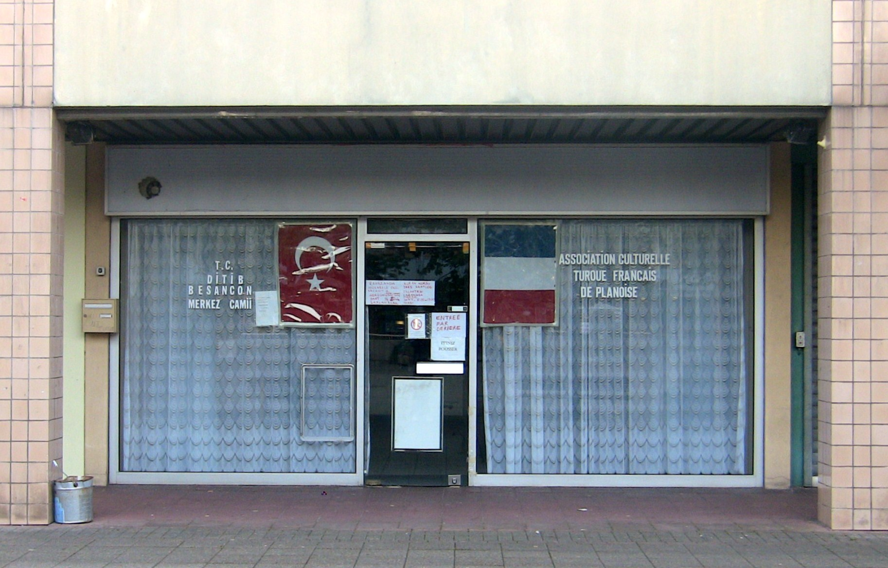 Association culturelle turque française de Planoise, à Besançon (Doubs, France).